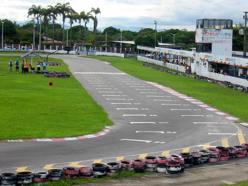 Imagem do grid de largada do Kartódromo